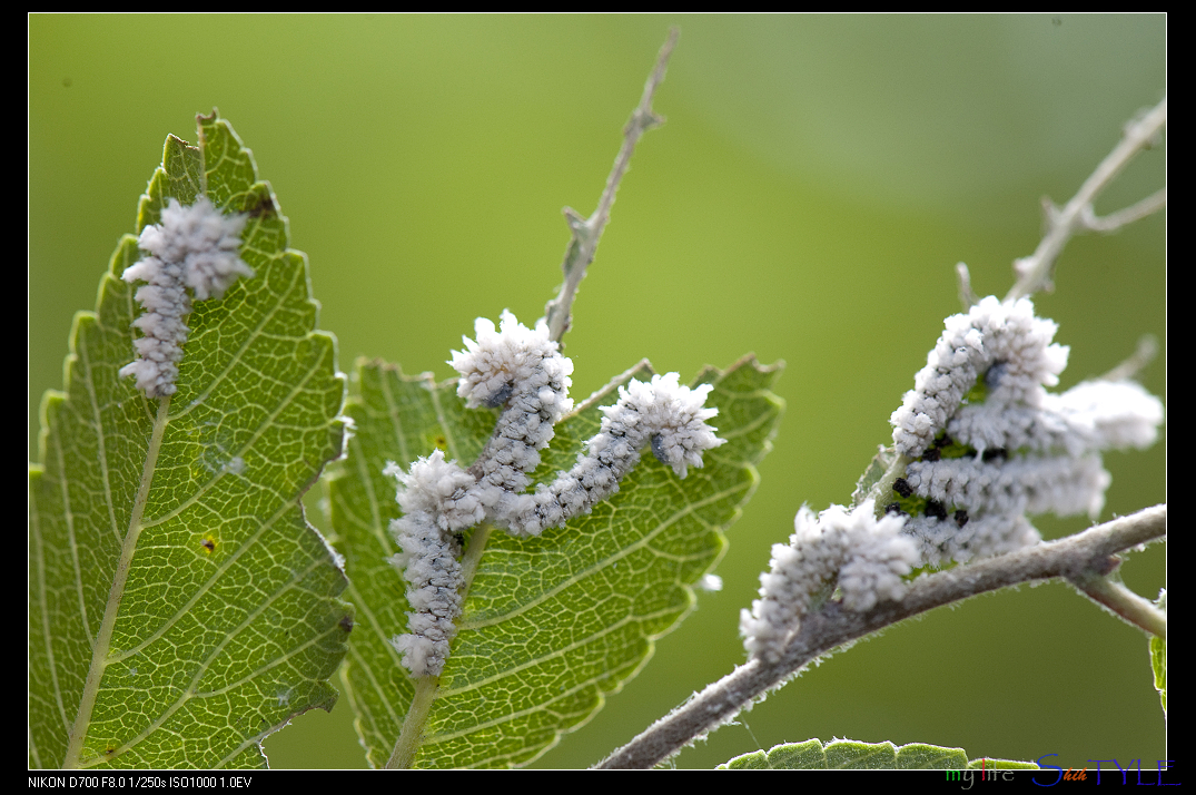 Epicopeia mencia